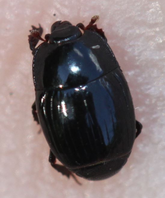 Vermutlich Eblisia minor am 15.7.2017 in der Schwetzinger Hardt